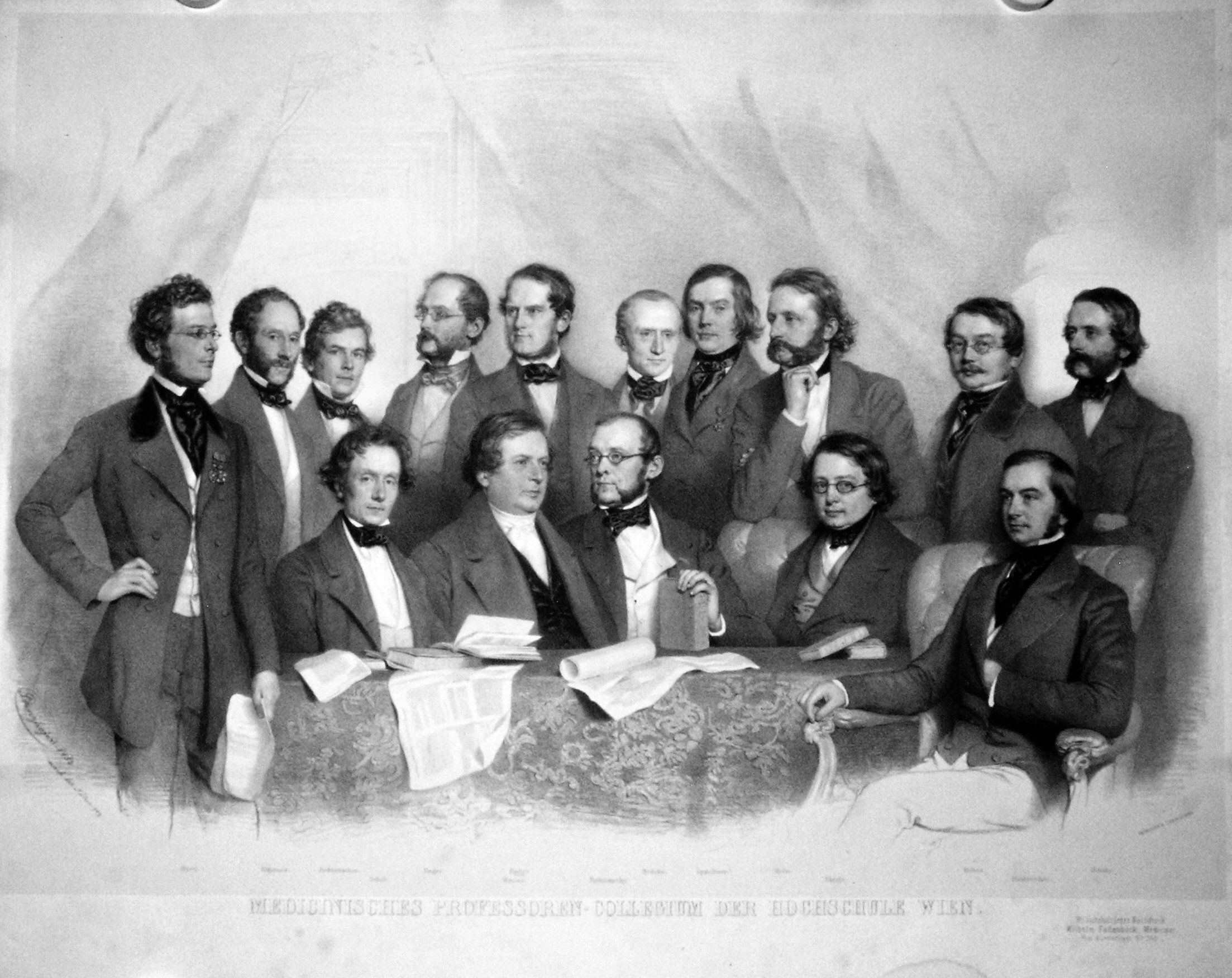 Medizinisches Professoren-Collegium der Hochschule Wien